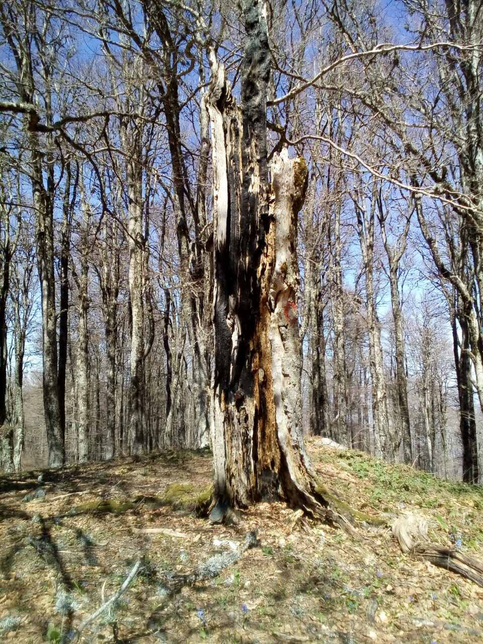 Врвот Кара Тепе (1.625 м) на планината Плачковица